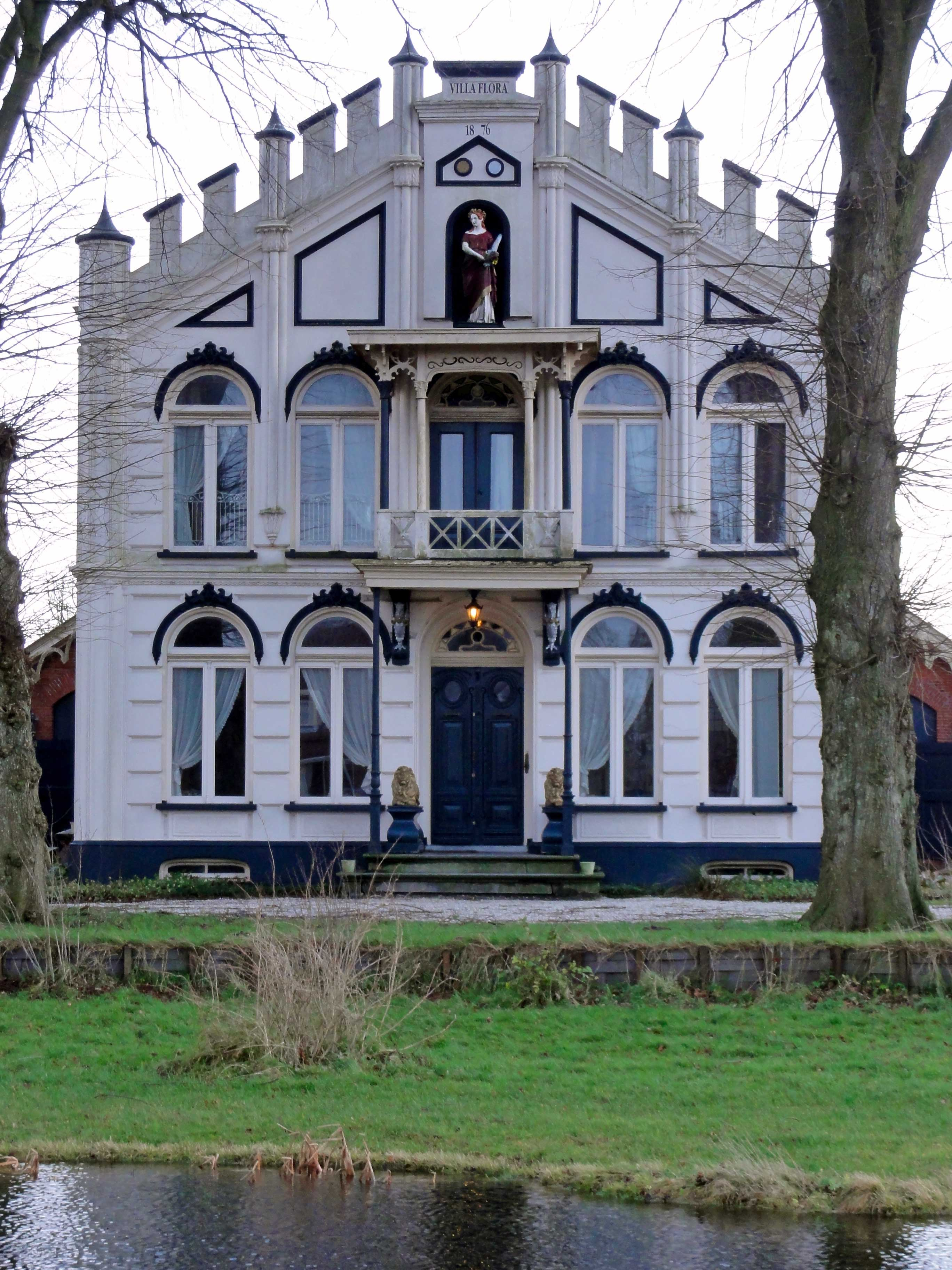 Villa Flora aan het Zuiderdiep in Nieuw-Buinen